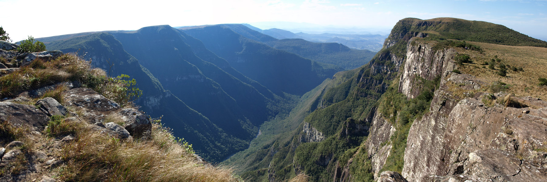 Panorâmica do Cânion Fortaleza no Parque Nacional da Serra Geral